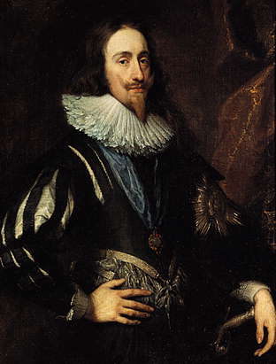 Karl I av England målad av Anthonis van Dyck, cirka 1632